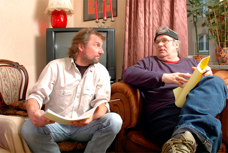 Marek Rębacz i Marek Perepeczko podczas prób do spektaklu "Wieruszka"